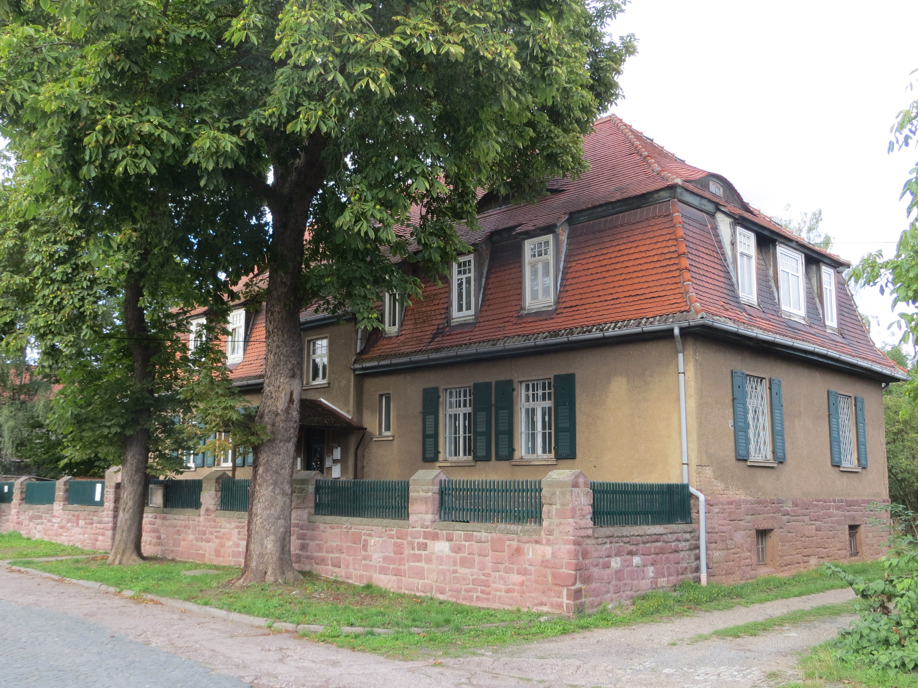 Hallesches oder Franckesches Waisenhausgut in Berga (Kyffhäuser), Gutshaus, Hainstraße 4This is a photograph of an architectural monument. 84239